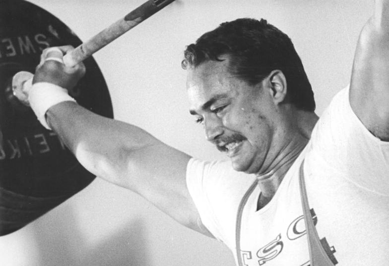 Michael Schubert ADN-ZB Thieme 24.06.1989 Karl-Marx-Stadt: DDR-Meisterschaften in Gewichtheben-Der Berliner Superschwergewichtler Michael Schubert (TSC) brachte im Reißen 195 kg zur Hochstrecke (DDR-Rekord) .